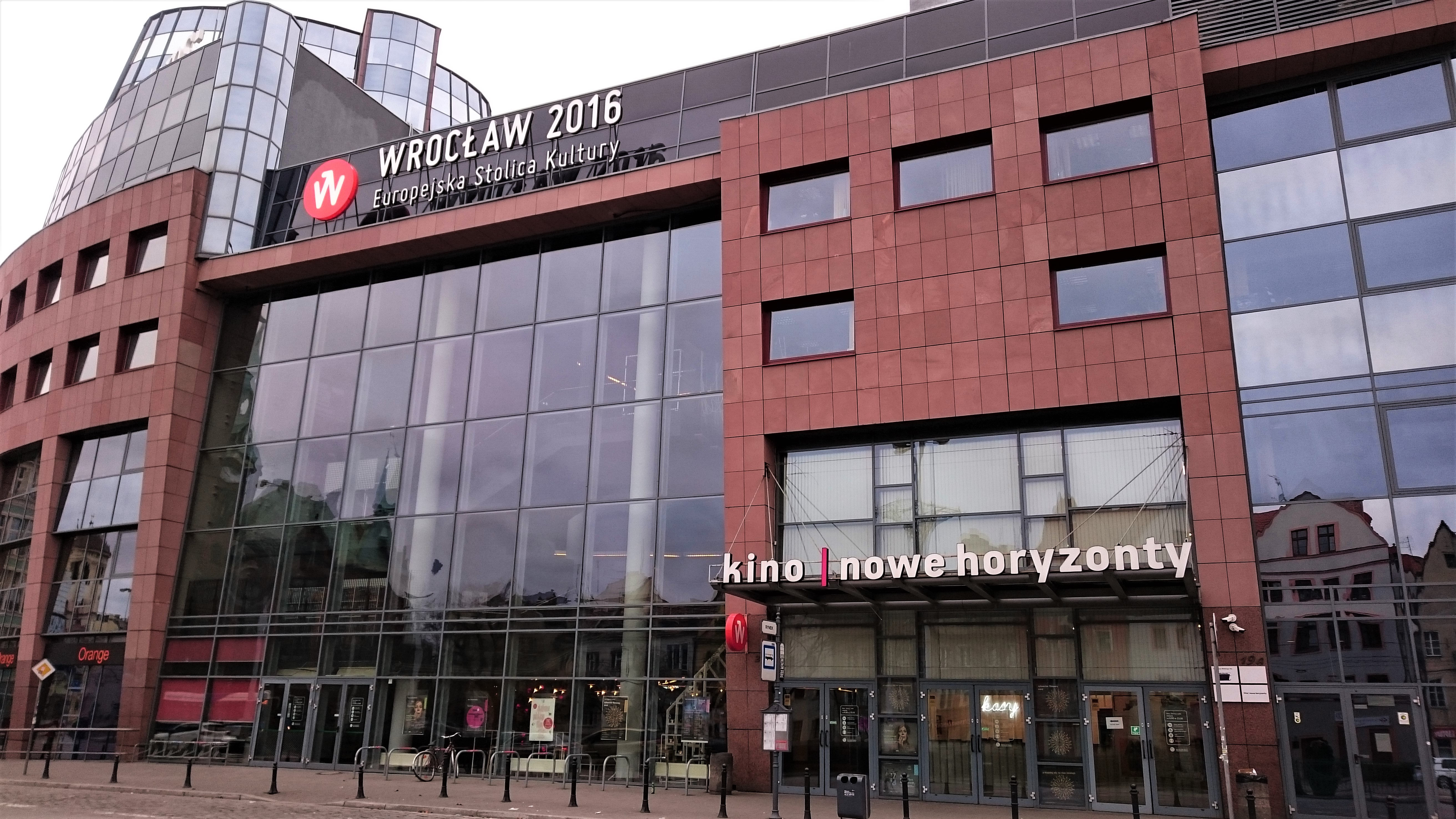 Budynek Wratislavia Tower we Wrocławiu, w którym znajduje się Kino Nowe Horyzonty